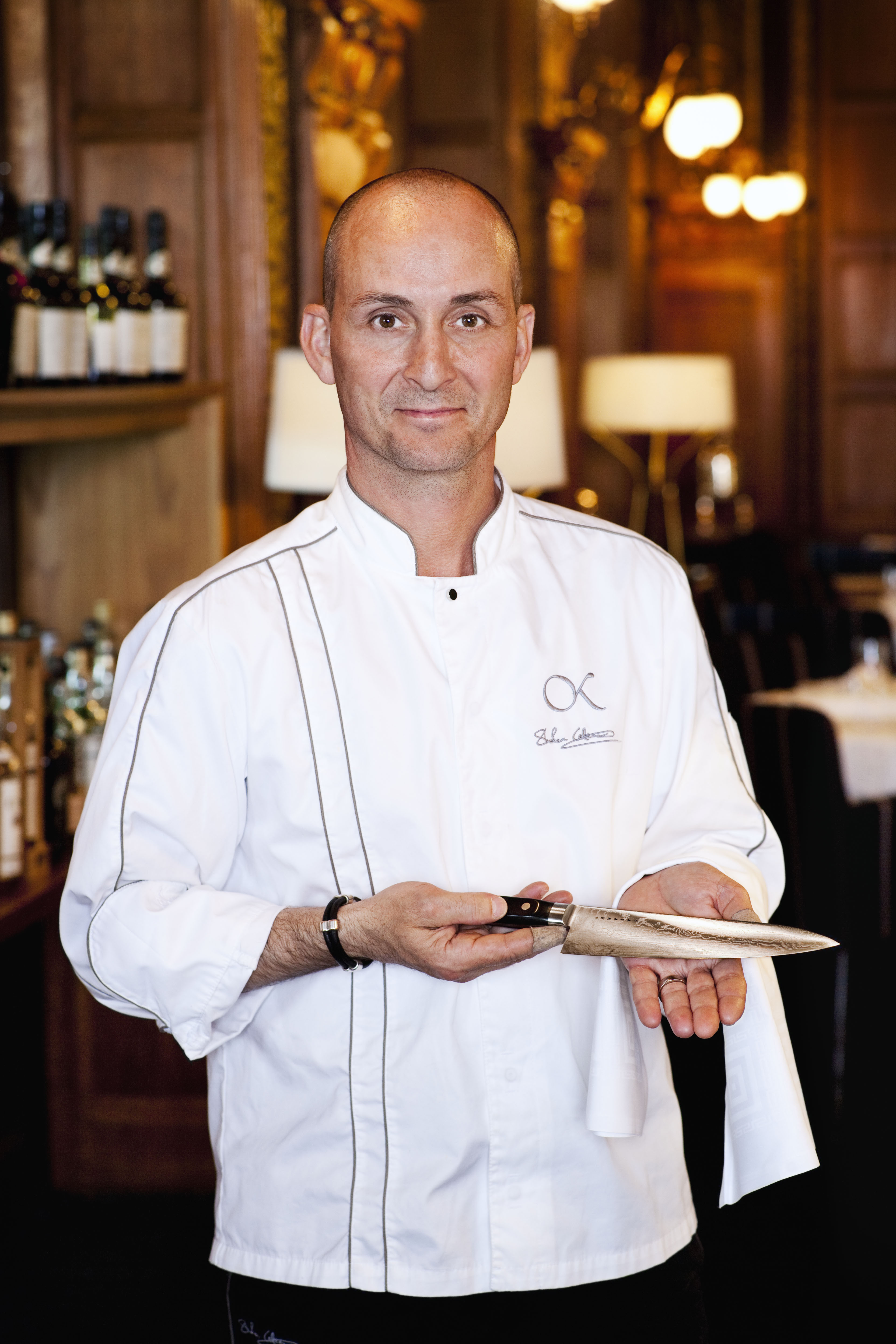 Kocken och krögaren Stefano Catenacci.